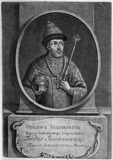 Федор Иванович Автор: Штенглин Иоганн Источник иллюстрации: Морозов А.В. Каталог моего собрания русских гравированных и литографированных портретов. М., 1913, Т.4. Место иллюстрации в источнике: стр. CDLXXIX